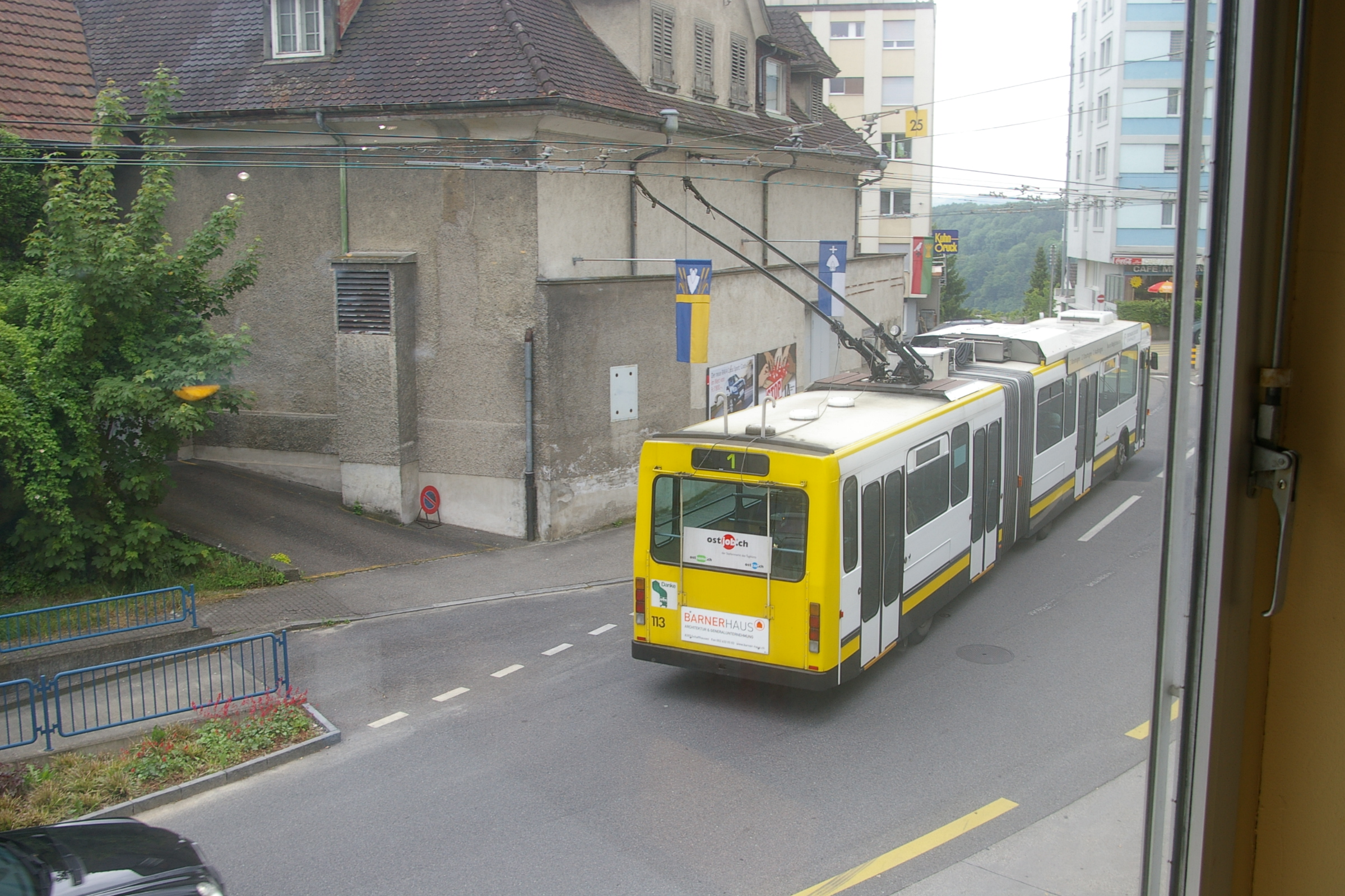 Trolleybus at Rheinfall / Neuhausen near Schaffhausen / Switzerland, photographed from Migros Restaurant